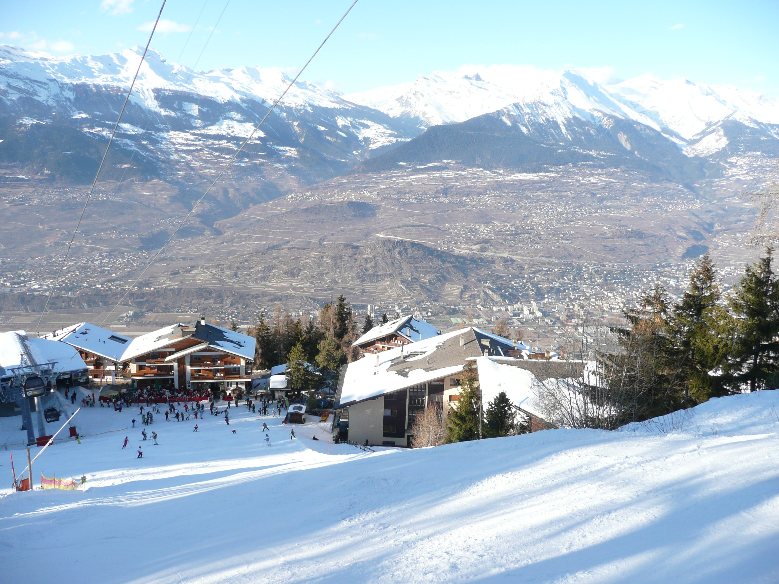 Cable car (télécabine) Veysonnaz, Hotel Magrappe, Appartment Magrappe